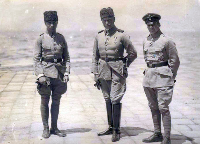 Buddecke, Liman von Sanders und Boelcke Weltkrieg 1916. Deutsche Helden im Orient. Hauptmann Buddecke, Marschall Liman von Sanders und Hauptmann Boelcke. [Türkei.- Gruppenbild mit Hauptmann Buddecke, Marschall Liman von Sanders und Hauptmann Boelcke] Abgebildete Personen: von links : Buddecke: Fliegerhauptmann und Chef der Flieger in Galipoli, Orden Pour le Mérite, Deutschland Liman von Sanders, Otto: General, Oberbefehlshaber der Türkischen Armee, Deutschland (GND 11878000X) Boelcke, Oswald: Hauptmann, Jagdflieger, kaiserliches Heer, Deutschland